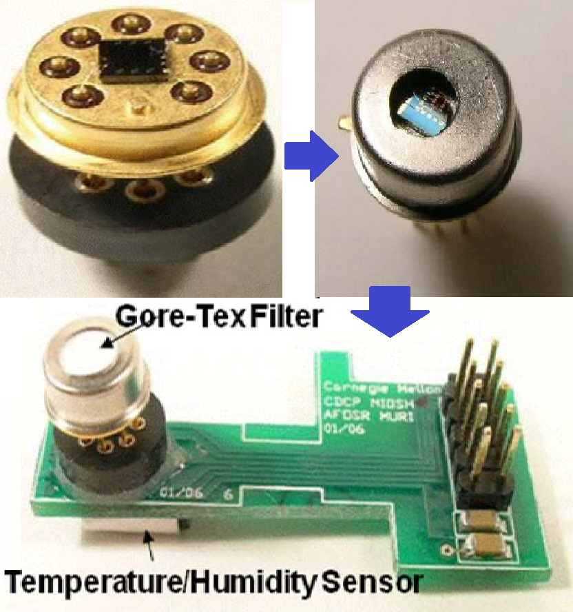 Перспективный датчик, используемый для определения приближения окончания срока службы противогазного фильтра (End of Servise Life Indicator ESLI)